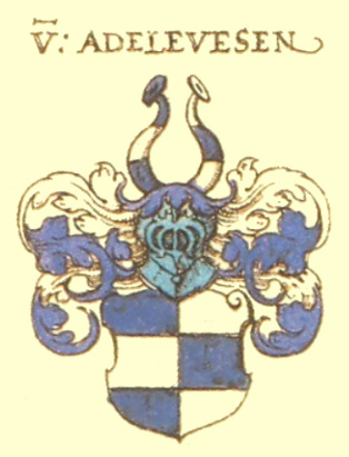 Wappen des Braunschweigischen Adelsgeschlechts Adelebsen